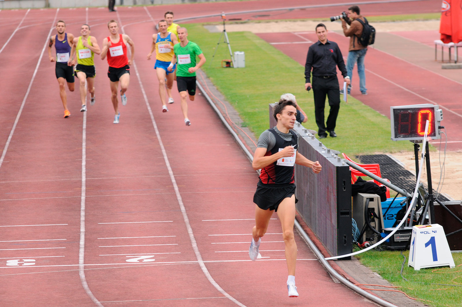 Adam Kszczot zwycięża w biegu na 800m podczas 2 Memoriału Kamili Skolimowskiej w Warszawie